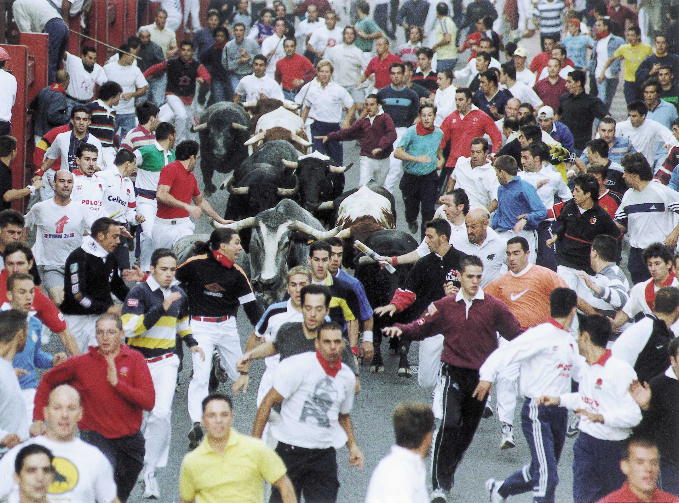 Imagen de los encierros en San Sebastián de los Reyes.